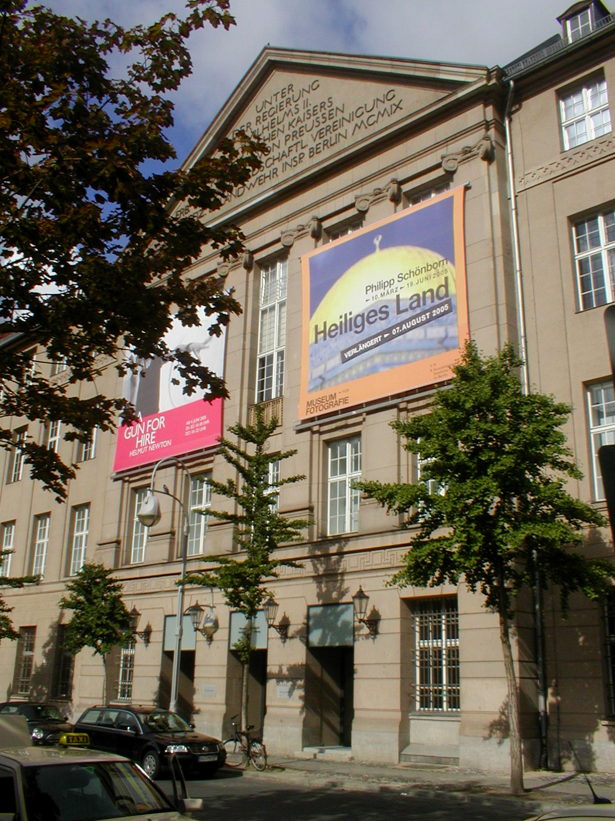 Das Museum für Fotografie (Berlin), Außenfassade, Blick vom Bahnhof Zoo